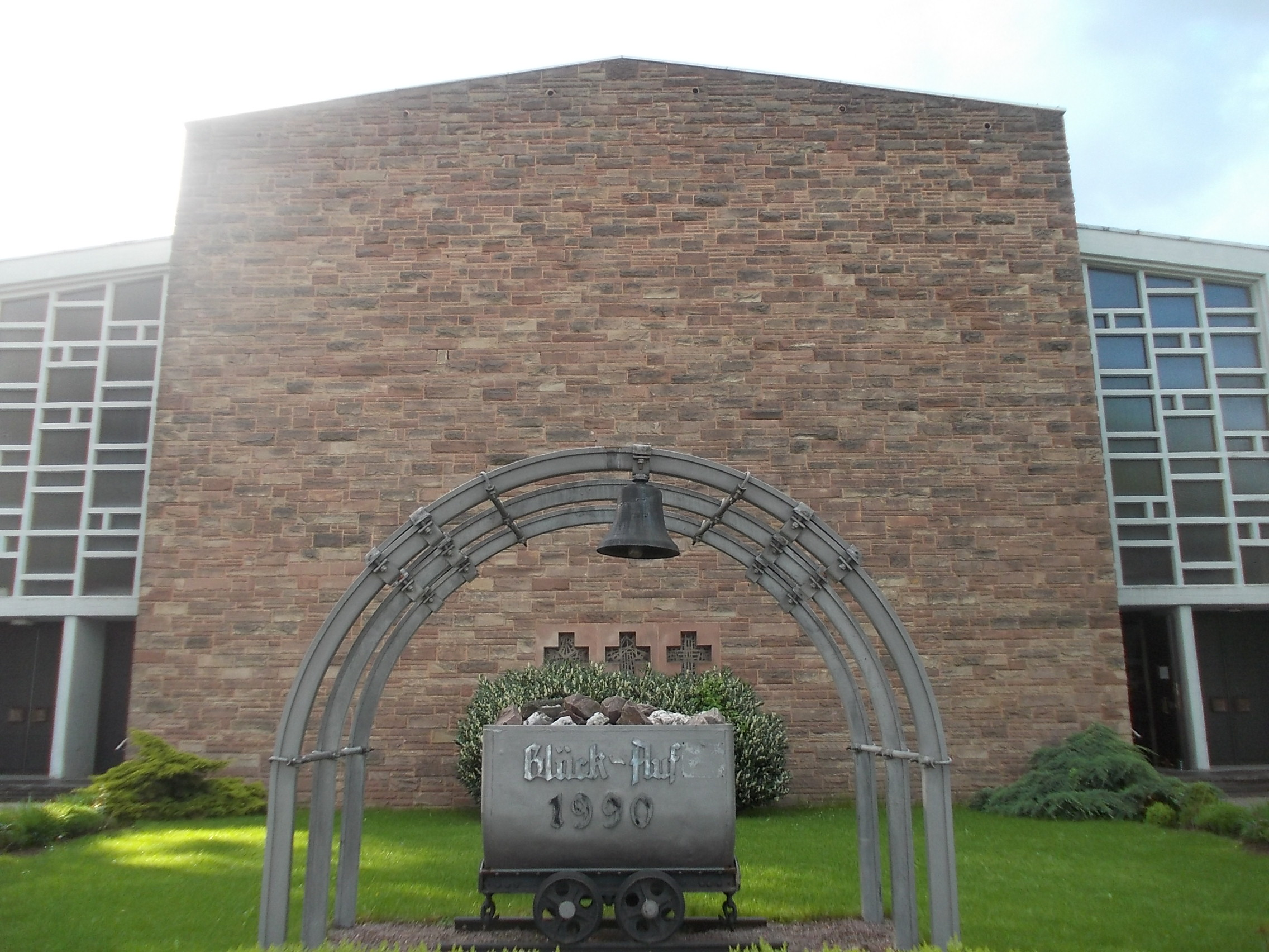 Kirche St. Josef in Saarlouis